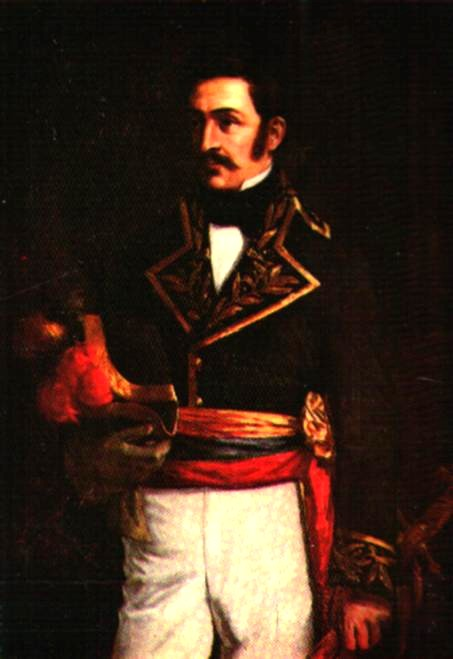 Foto de retrato de José Félix Ribas, de la Colección Galería de Arte Nacional. Uso público sin ánimos de lucro. Patrimonio nacional de la República Bolivariana de Venezuela